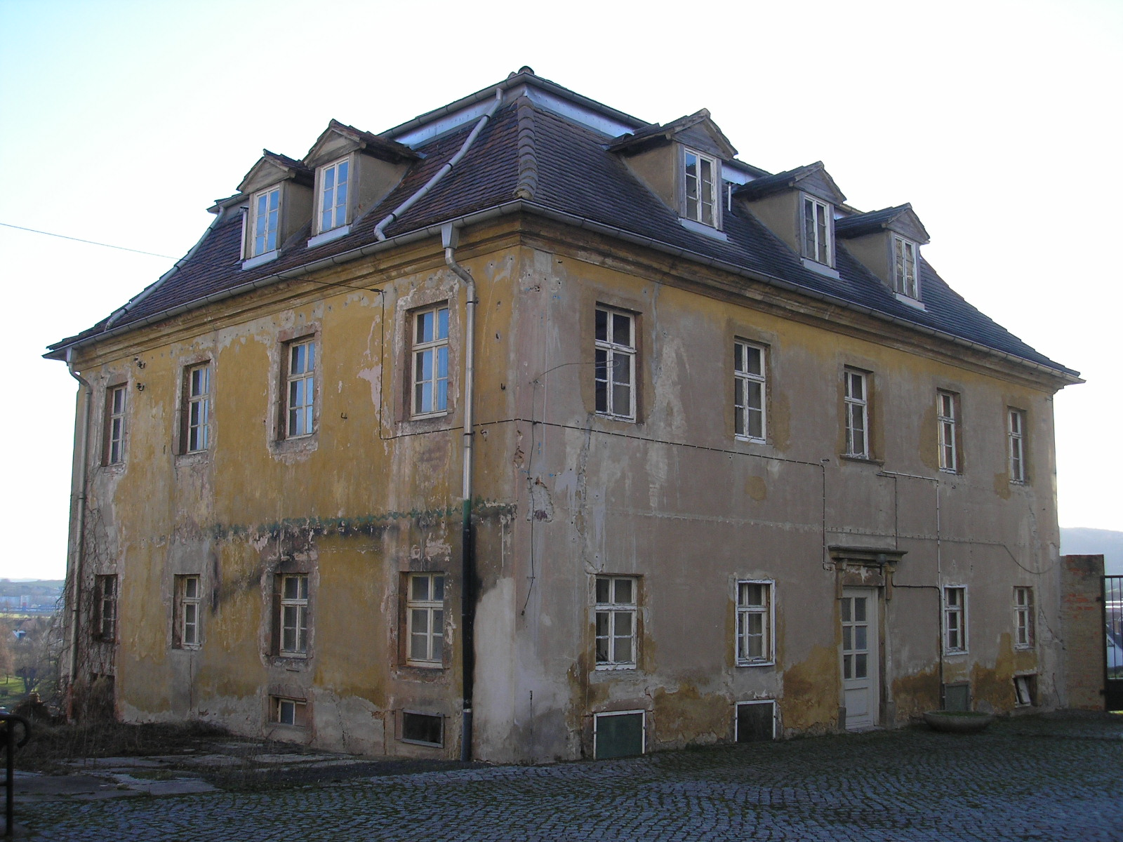 Schloss Crossen (Thüringen).